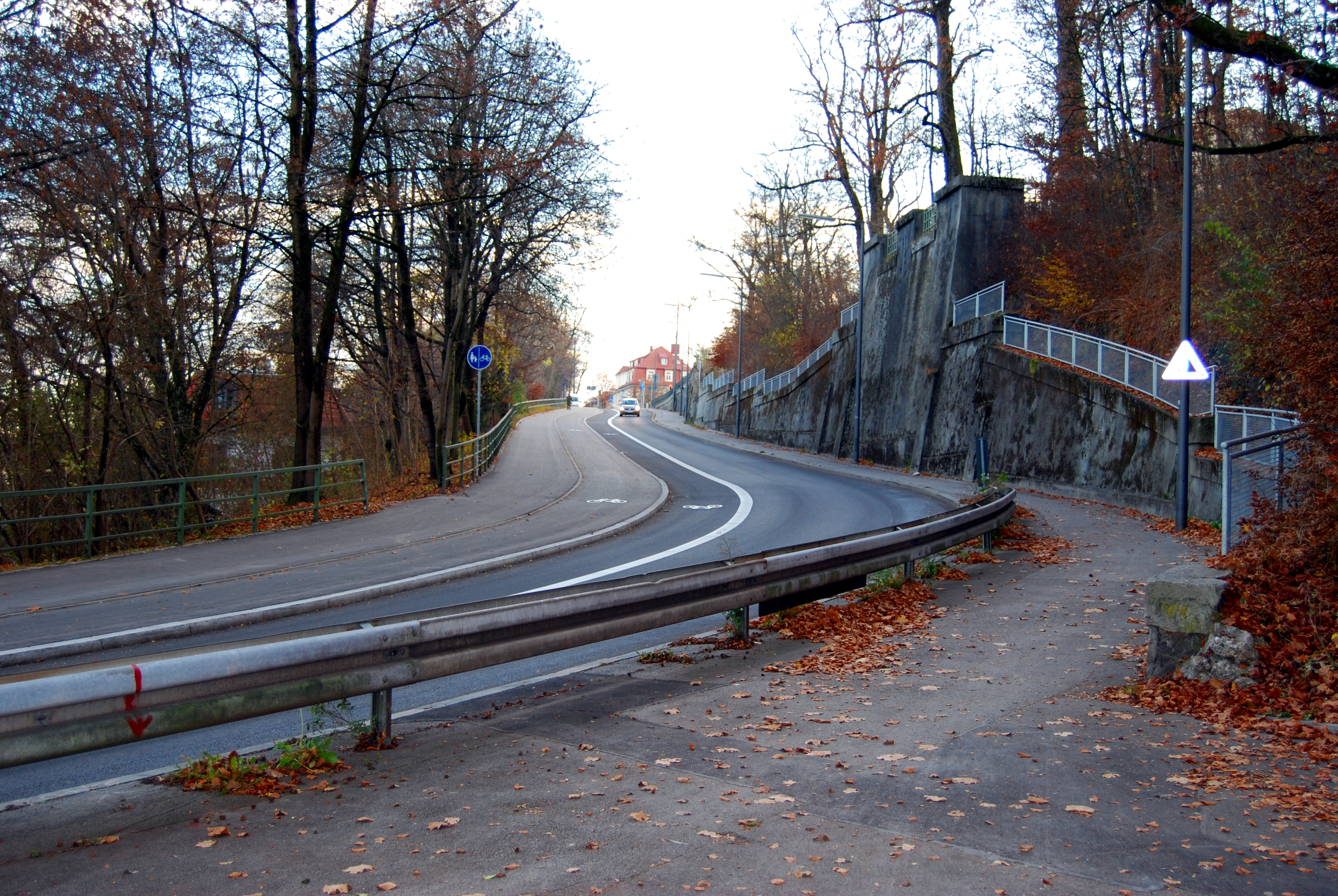 Greinerberg in München-Sendling bzw. München-Thalkirchen auf Höhe der Zennerstraße; Blick Richtung Süden